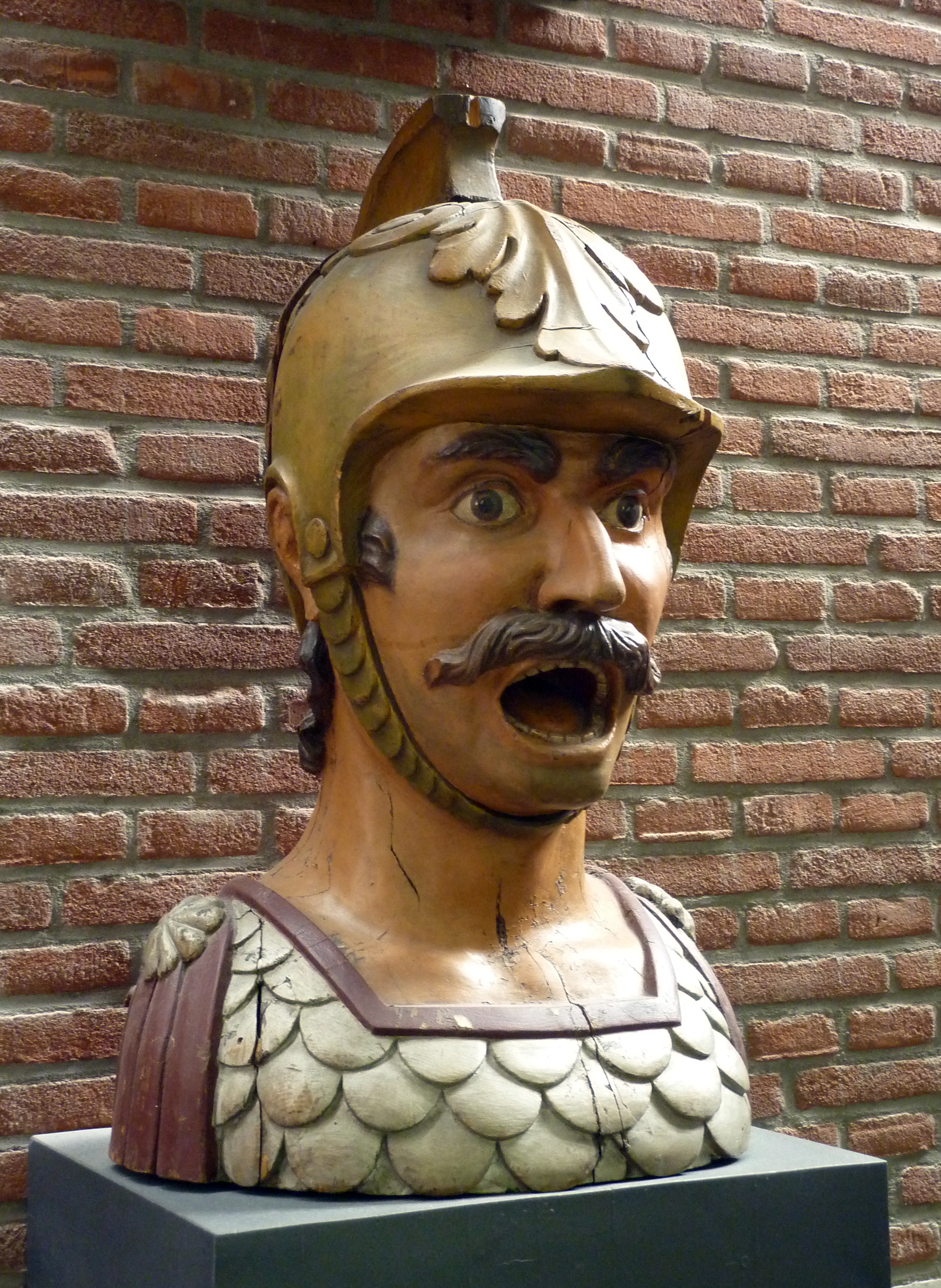 Museum Boerhaave, Leiden